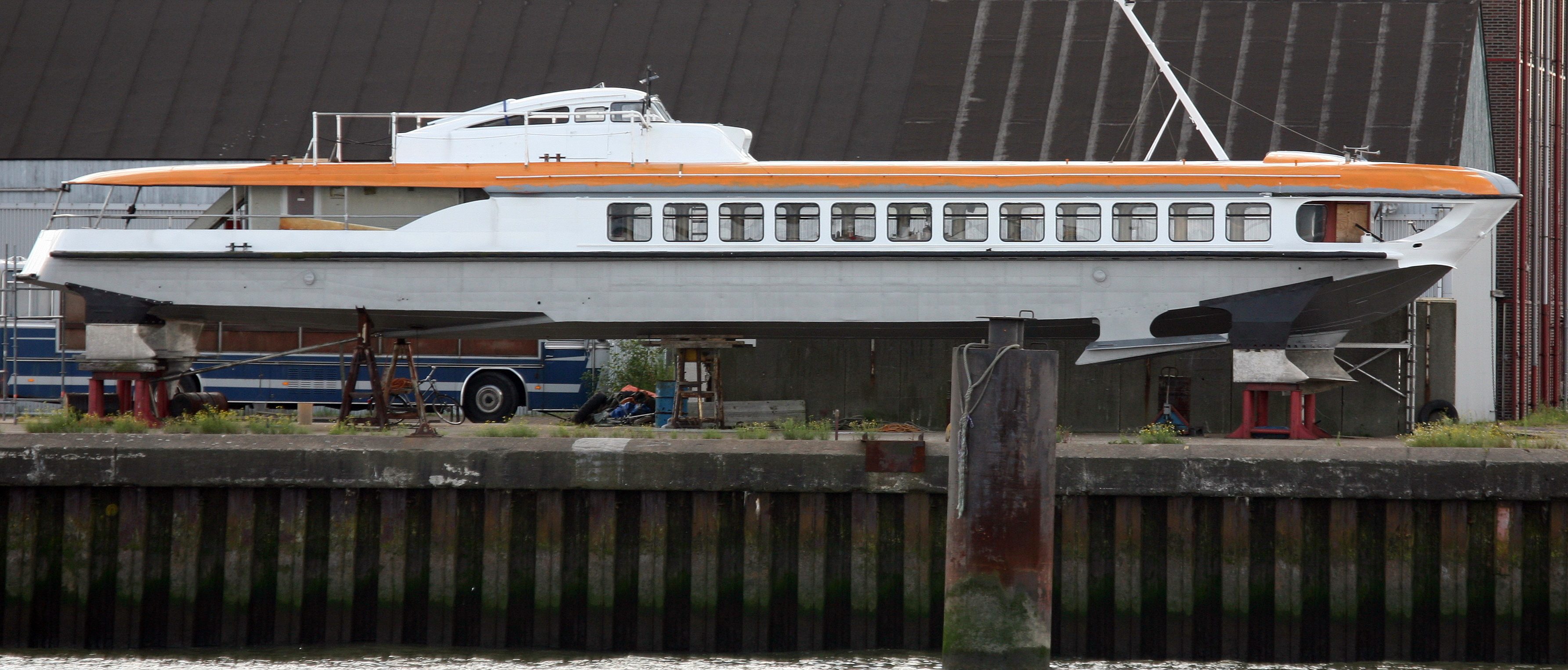 Der Rheinpfeil 2007 während des Umbaus zum Hausboot im Gelände des Rottedamer Hafens.